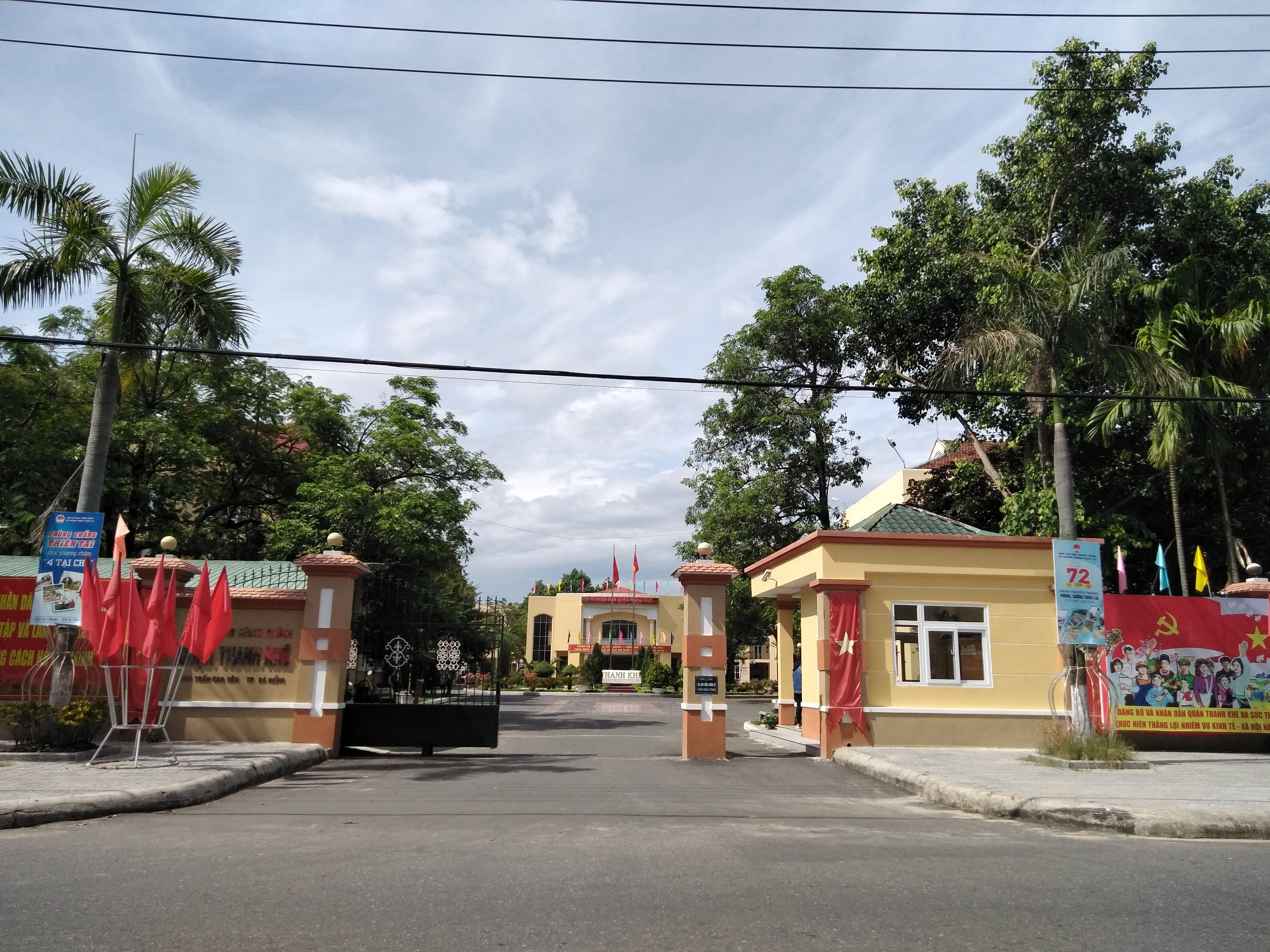 UBND quận Thanh Khê, Đà Nẵng